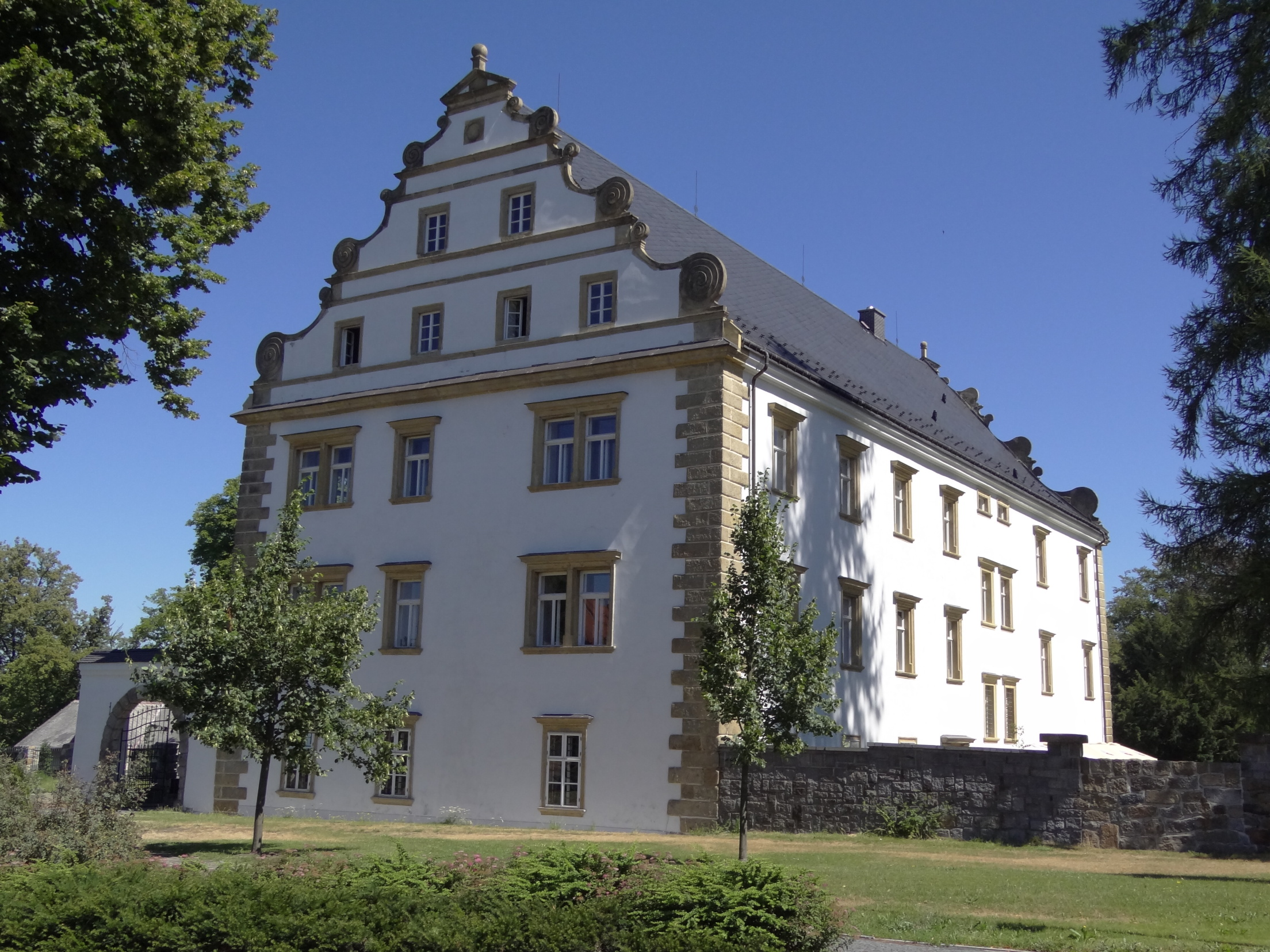 Zámek Šluknov, Zámecká 642, Šluknov.